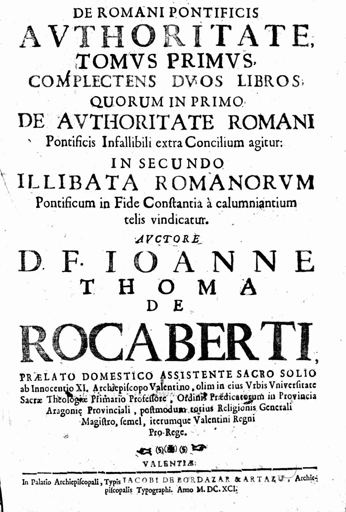 Frontespizio